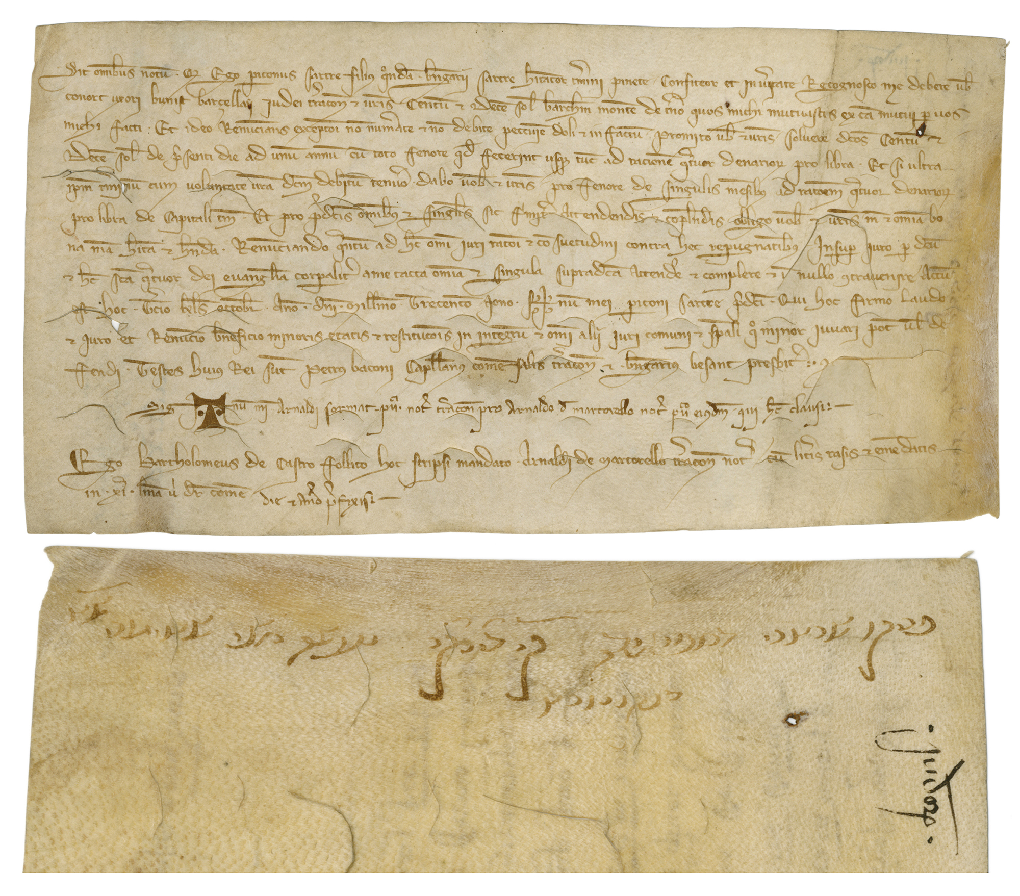 Dades tècniques: Fons: Municipal de Reus. Col·lecció Pergamins Autor: 29 de setembre de 1309. Tarragona Suport: pergamí Tècnica: manuscrit, tinta sobre pergamí Dimensions: 13 x 25 cm. Pergamí aljamiat amb talls de cancelació. Obligació firmada per Pericó Sartre, fill de Berenguer Sartre, difunt, del terme de la Pineda, de cent deu sous barcelonesos, moneda de tern, a favor de Conort, esposa de Bunist Barçelay, jueu de Tarragona, a 3 calendes d’octubre de l’any 1309. A la Col·lecció de pergamins del fons Municipal es conserva una carpeta anomenada Jueus (1275-1347) amb dinou pergamins, al dors de set d’aquests hi ha escrits breus textos en hebreu. A Reus tenim notícies d’una petita comunitat jueva a partir de l’any 1242 situada al barri de la Merceria, al centre històric de la ciutat a les proximitats del Raval Sant Pere i de la Plaça de les Peixateries, fins a l’expulsió l’any 1492.